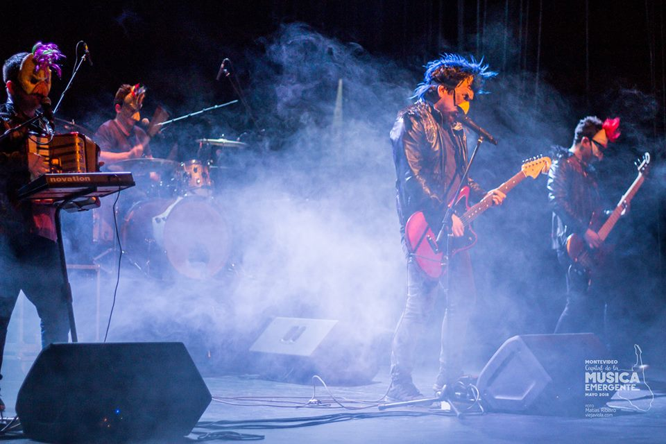 FOTO KIMEROS URUGUAY (Sala Zitarrosa, Montevideo-Uruguay)